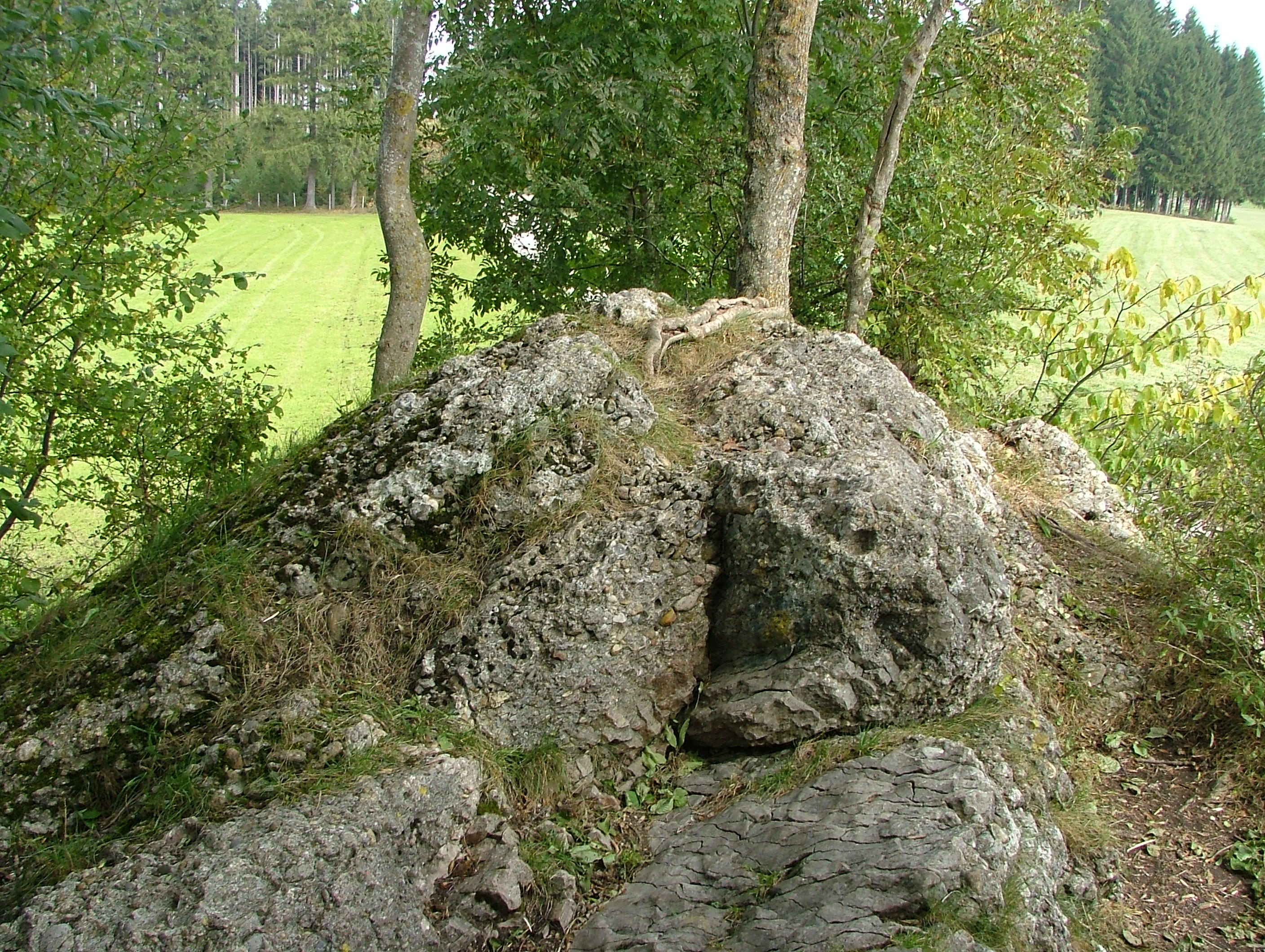 Findling